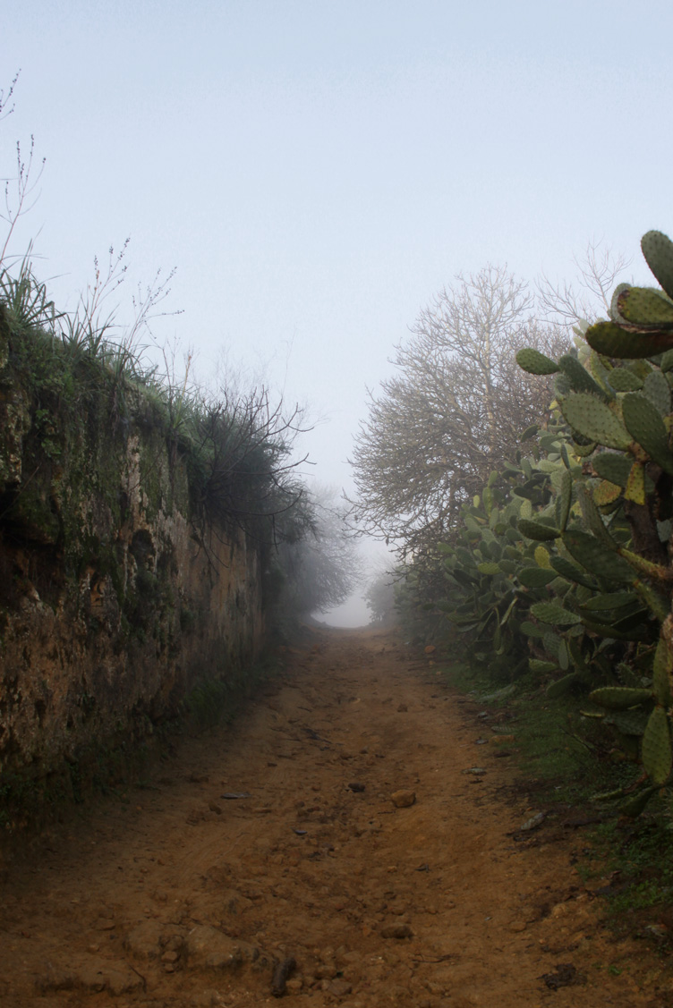 Calle Real de Gandul